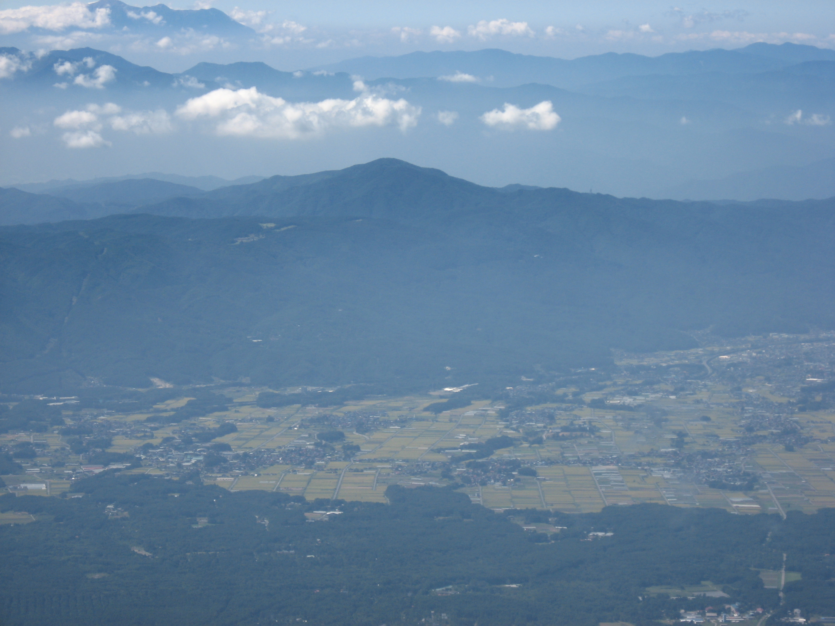 赤岳山頂より望む守屋山